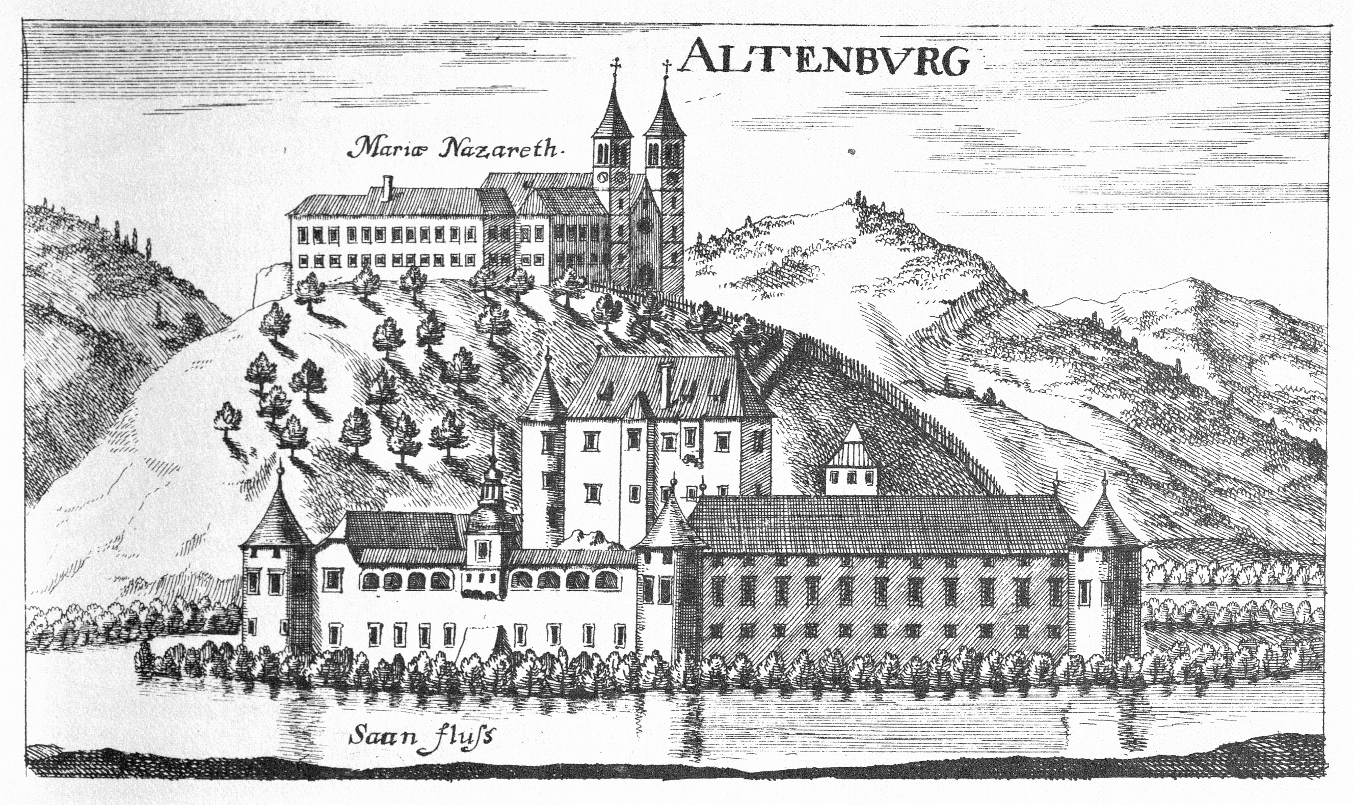 G. M. Vischers Käyserlichen Geographi, Topographia Ducatus Stiriae, Das ist: Eigentliche Delineation / und Abbildung aller Städte / Schlösser / Marcktfleck / Lustgärten / Probsteyen / Stiffter / Clöster und Kirchen / so es sich im Herzogthumb Steyrmarck befinden; Und anjetzo Umb einen billichen Preyß zu finden seynd Bey Johann Bitsch Universitäts Buchhandlern / Auff dem Juden=Platz bey der guldenen Saulen. Graz 1681